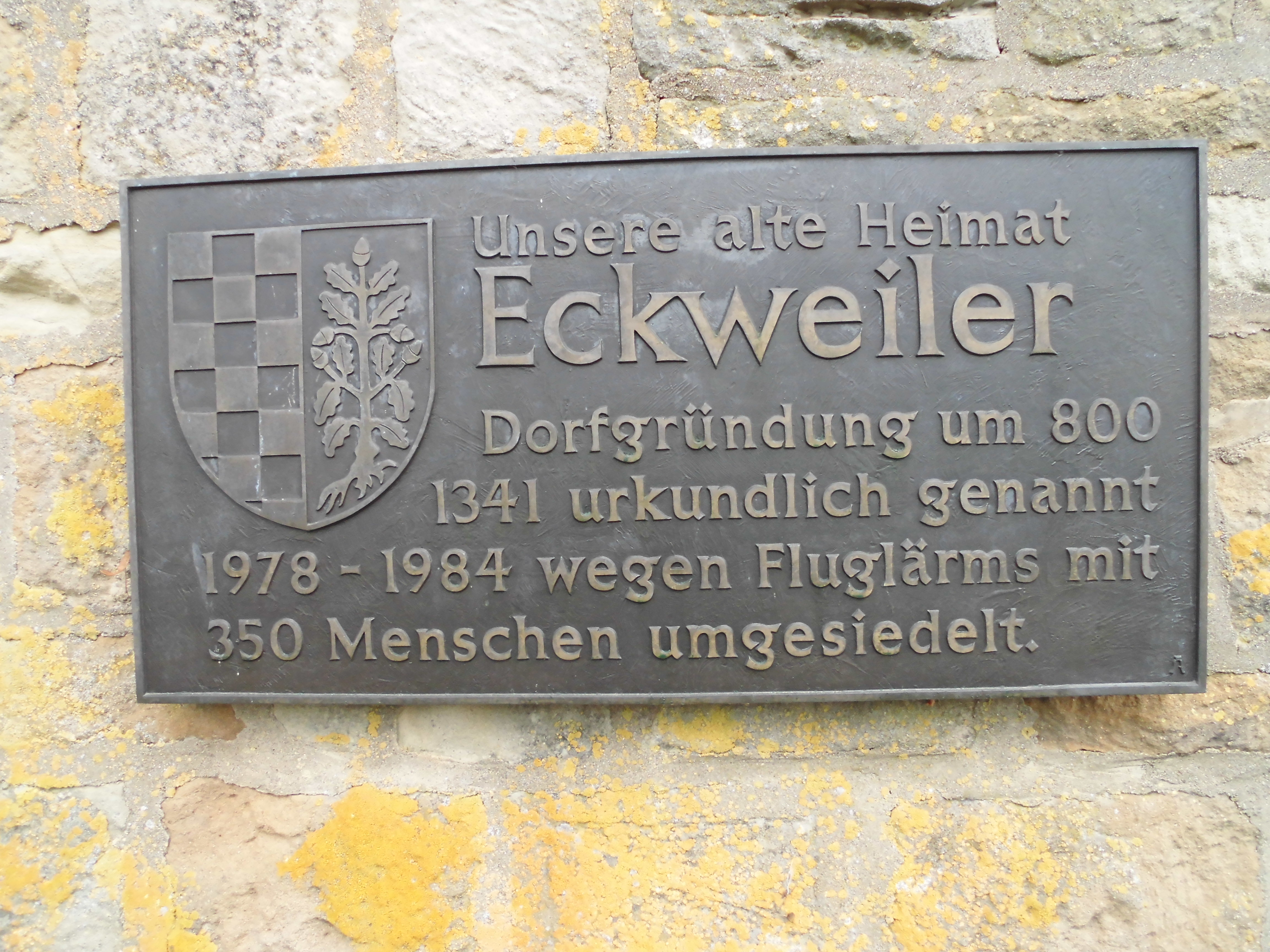 Gedenktafel an der Kirchenmauer in Eckweiler